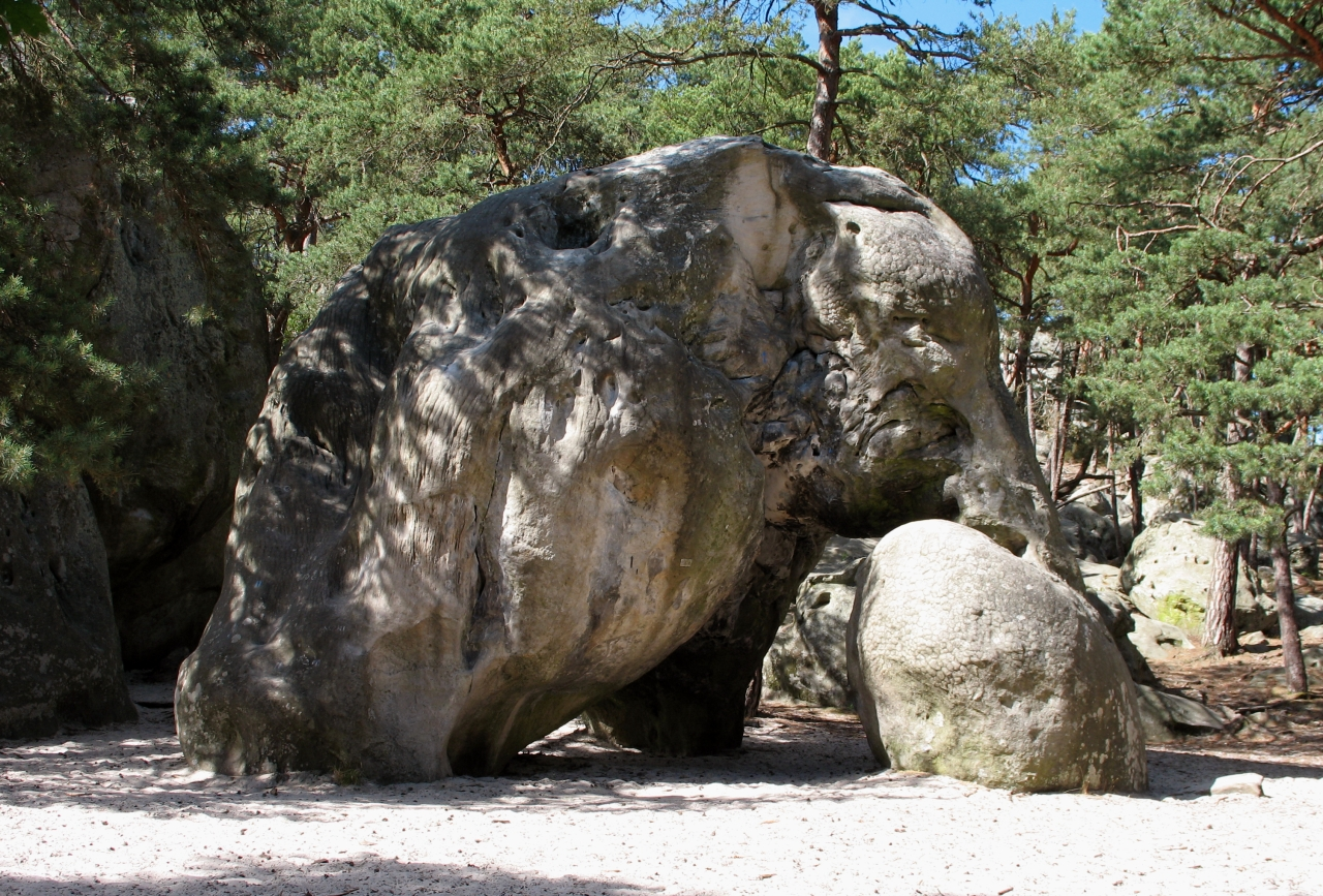 Elephant. Bekannte Felsformation in der Form eines Elefanten im Wald von Fontainebleau bei Paris, Larchant.